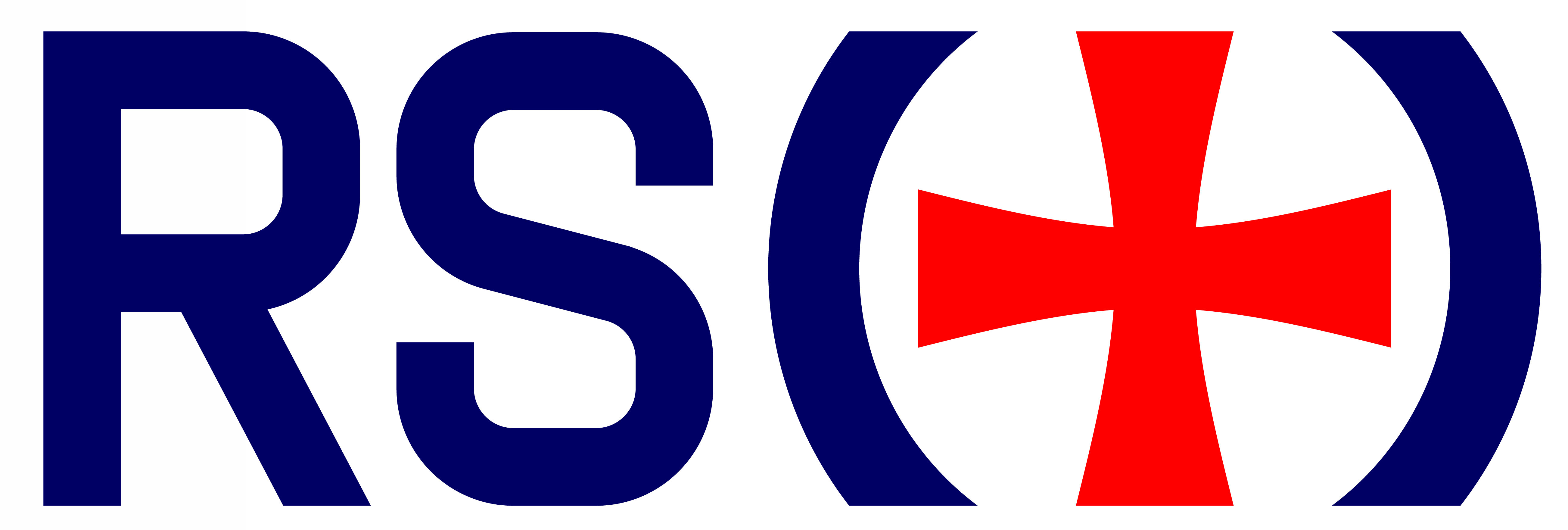 Redningsselskapets logo siden 2010